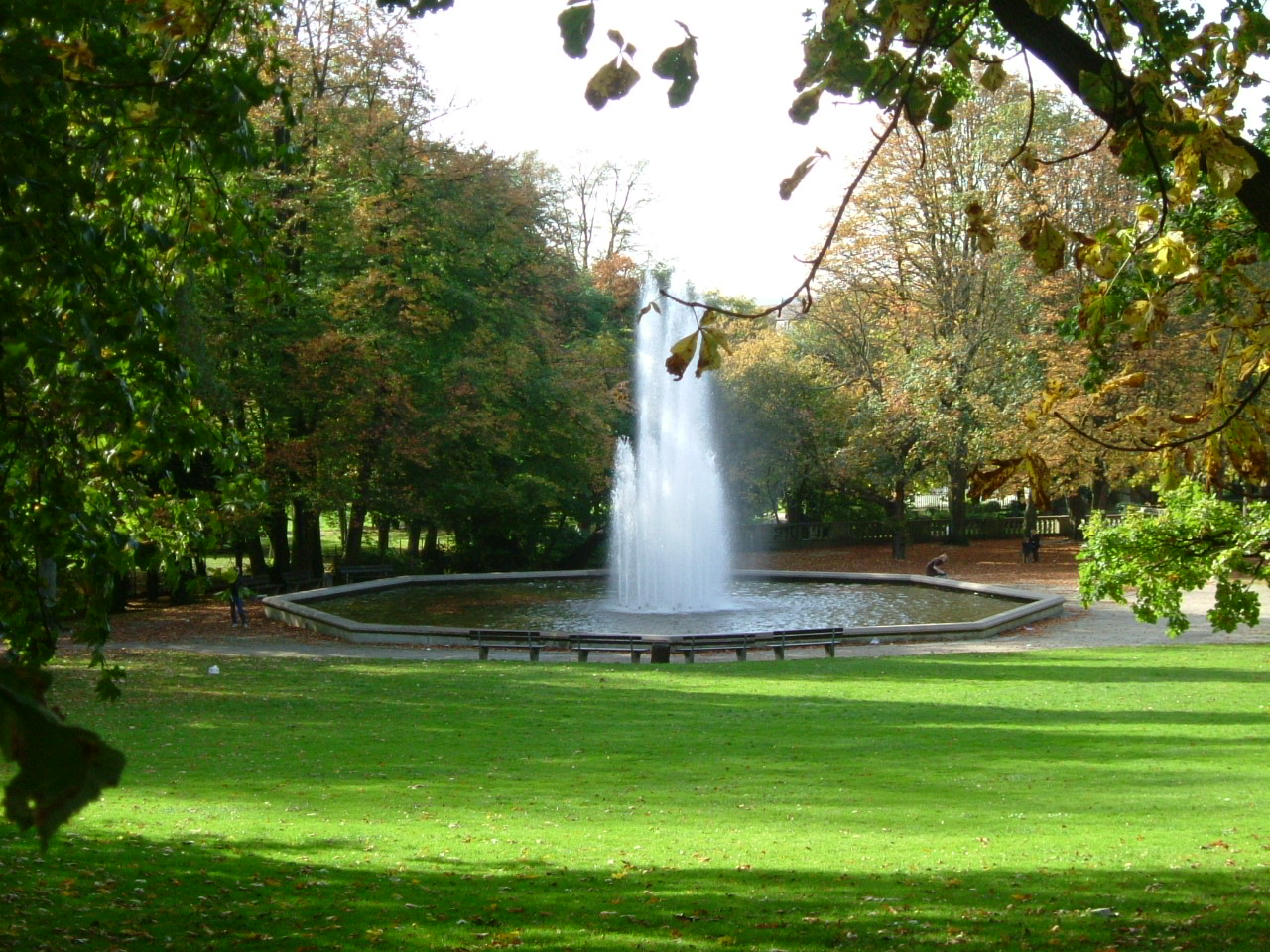 Kurparkfontaine im Kurpark von Aachen